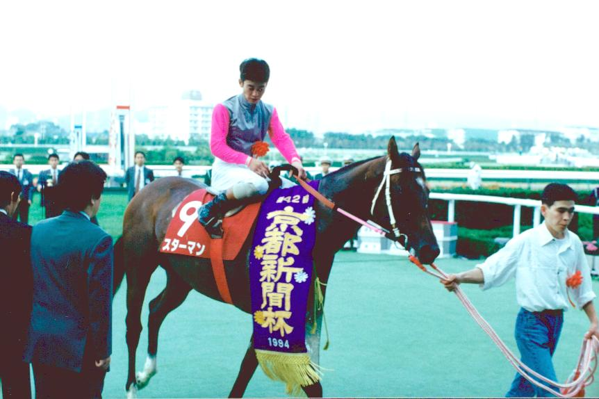 スターマン